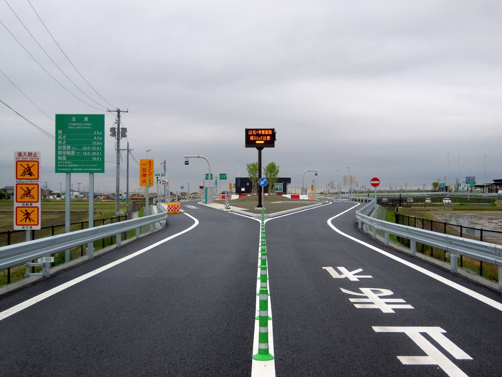 宮城県亘理郡亘理町にある常磐自動車道鳥の海スマートインターチェンジ料金所を一般道側から